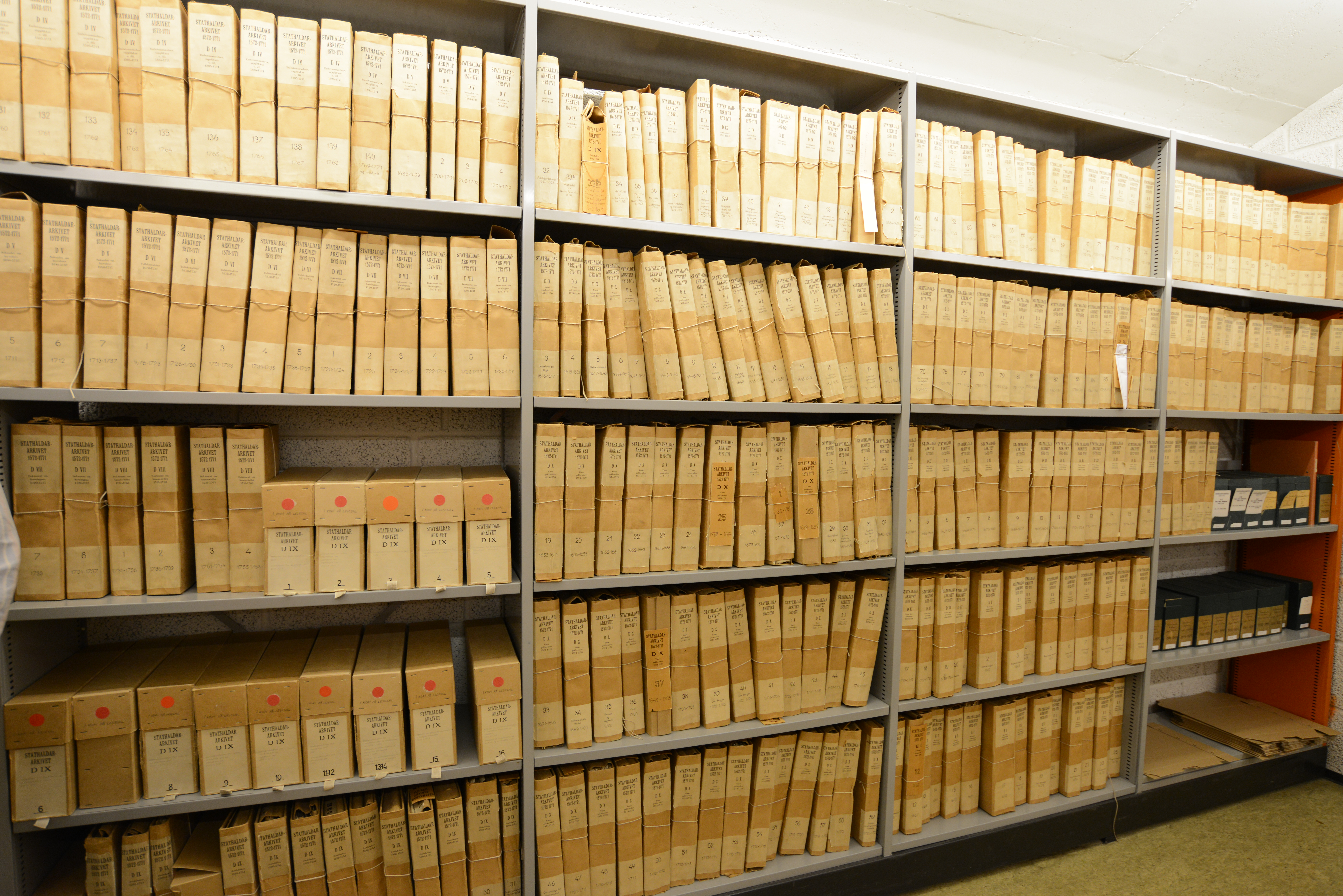 Stattholderarkivet ved Riksarkivet